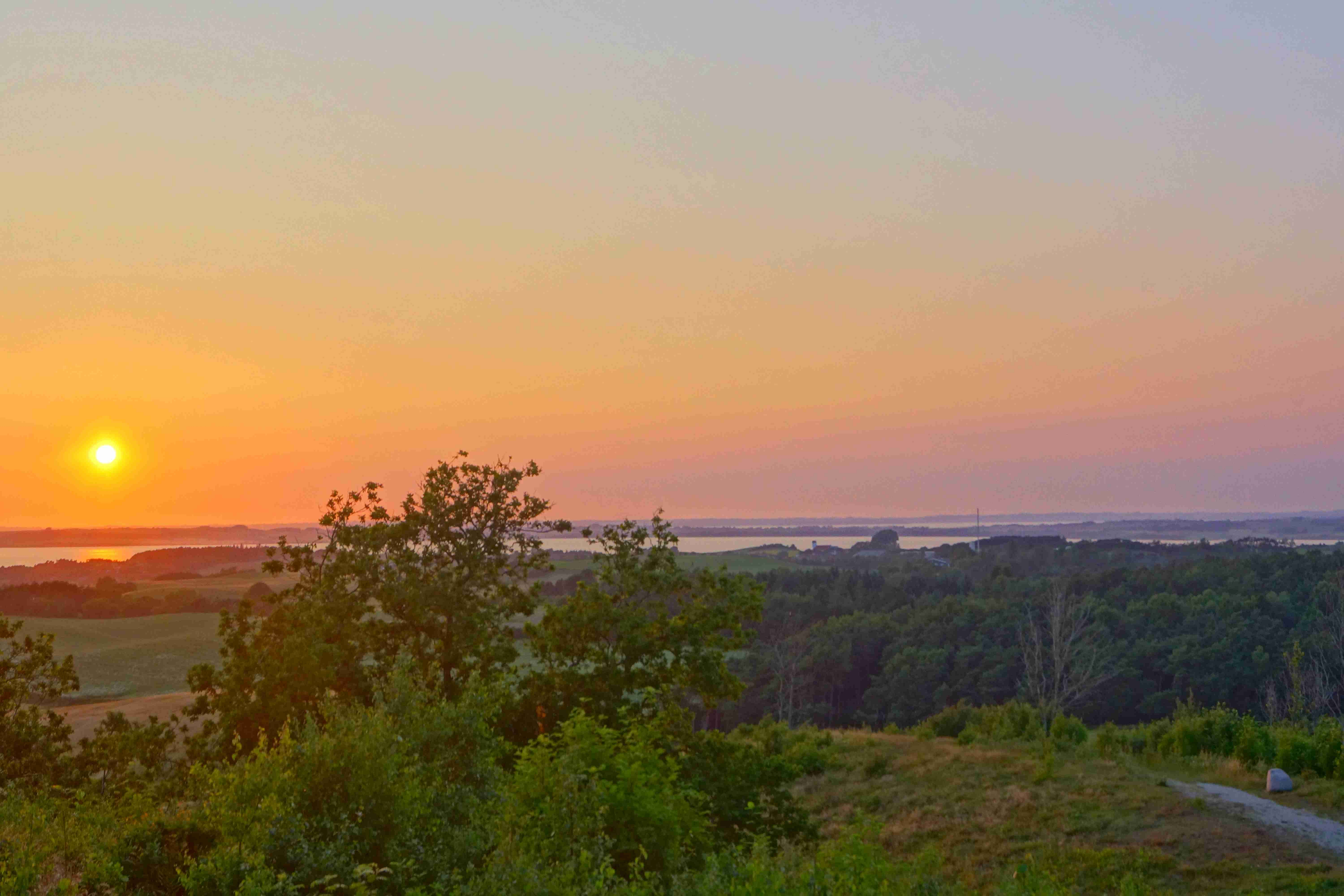 Udsigt fra Ellemandsbjerg, Helgenæs, Mols, Sydlige Djursland.